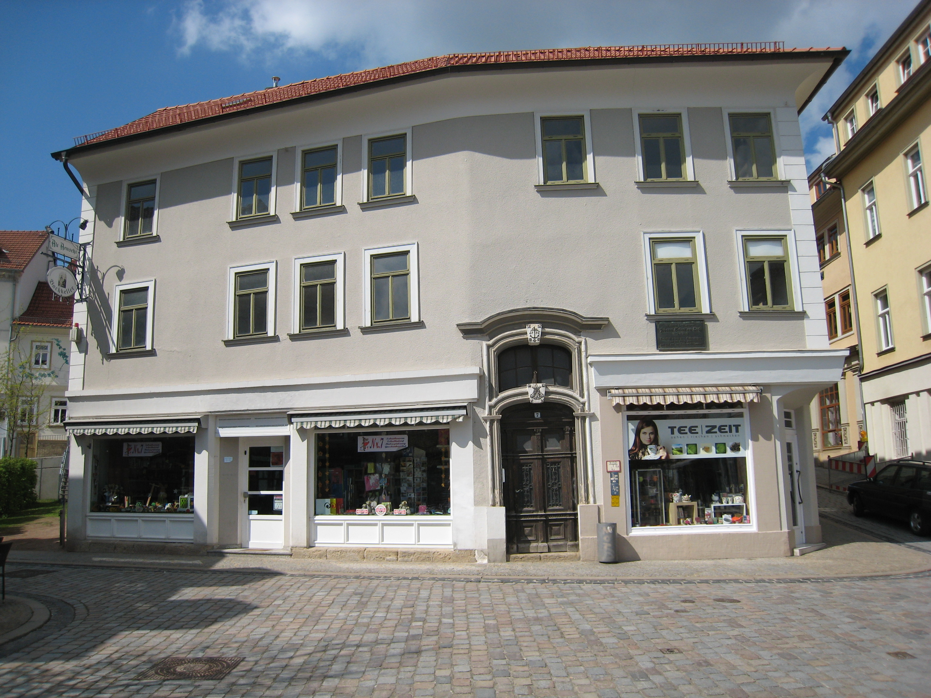 Eine mögliche Wohnstatt von Johann Sebastian Bach in Arnstadt (Ledermarkt 7).